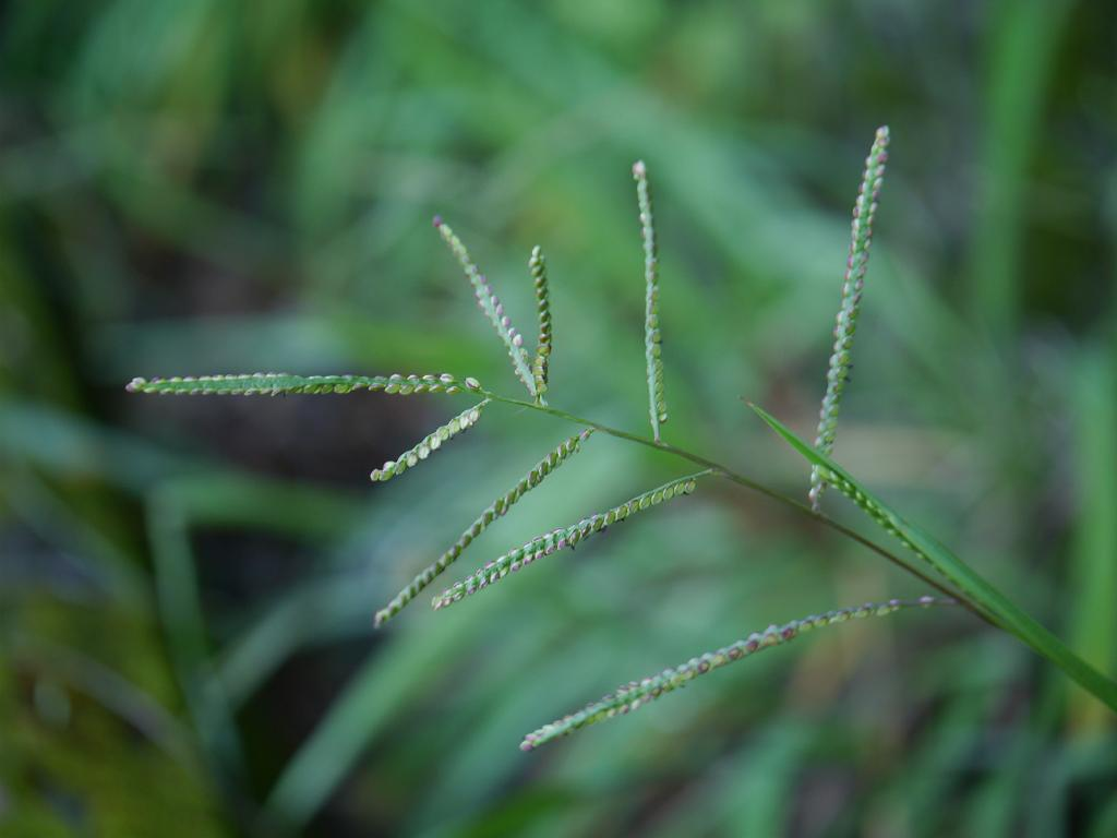 Paspalum thunbergii：スズメノヒエ 2015/10/12 和歌山県田辺市：Tanabe City. Wakayama Pref. Japan